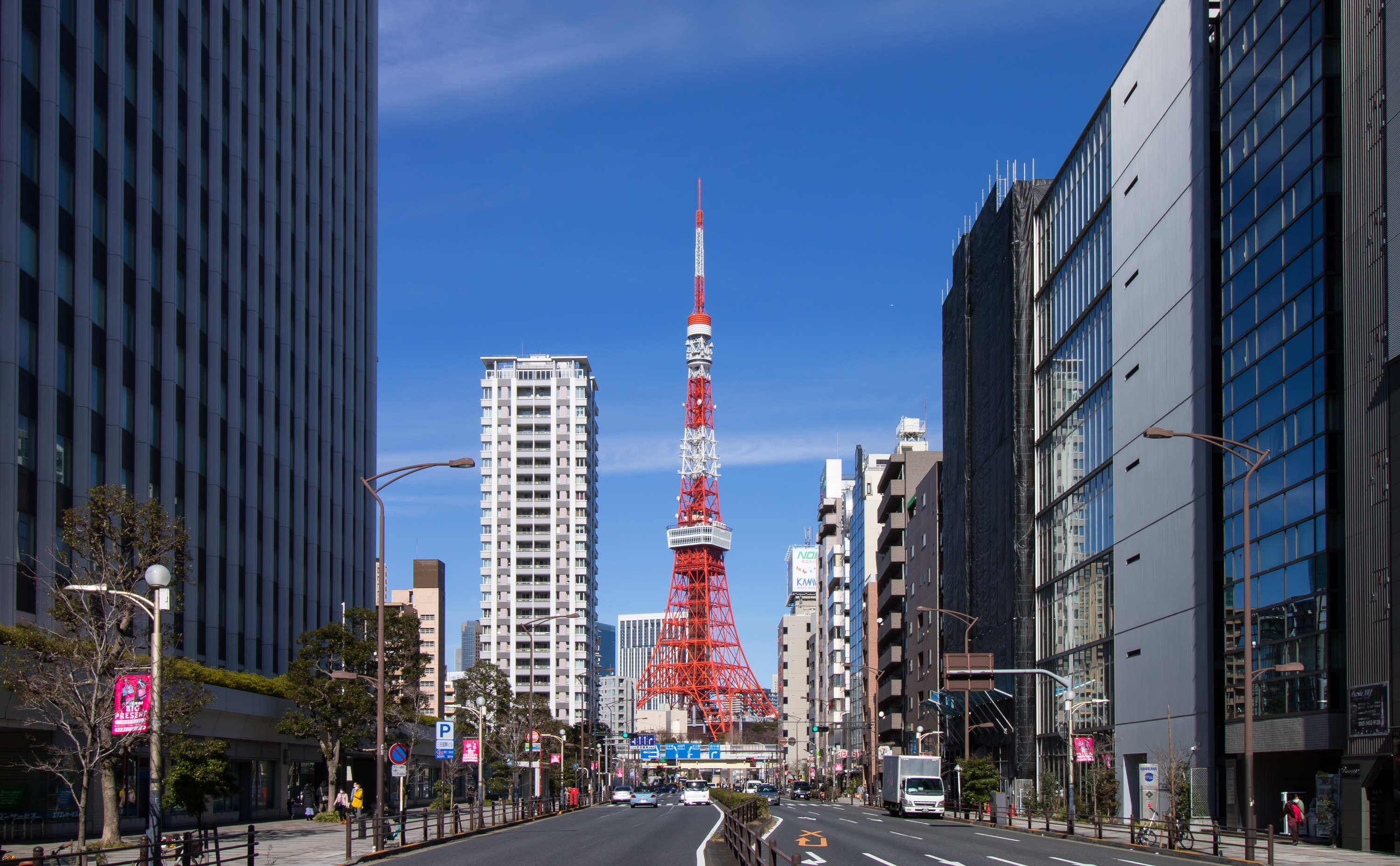 国道1号より東京タワー